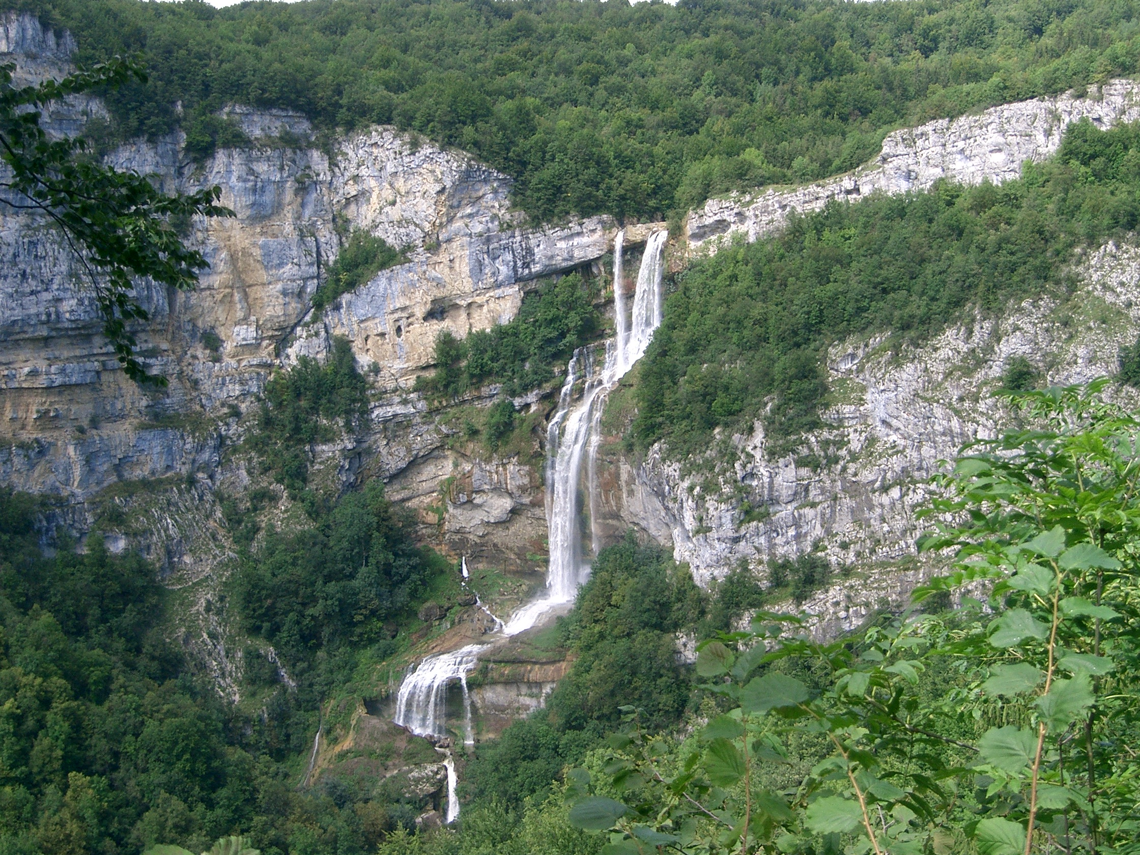 Chute de l'Albarine (Ain), dite la Charabotte, de plus de 100 mètres (3 sauts de 60, 40 et 15 mètres) après des pluies abondantes au mois d'août.